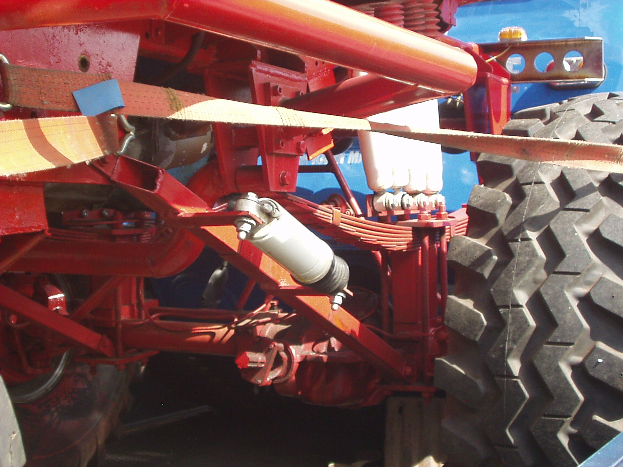 Blick auf das Fahrgestell eines Monstertrucks